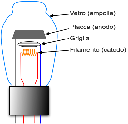 Schema degli elementi del Triodo, o tubo a vuoto, o valvola termoionica